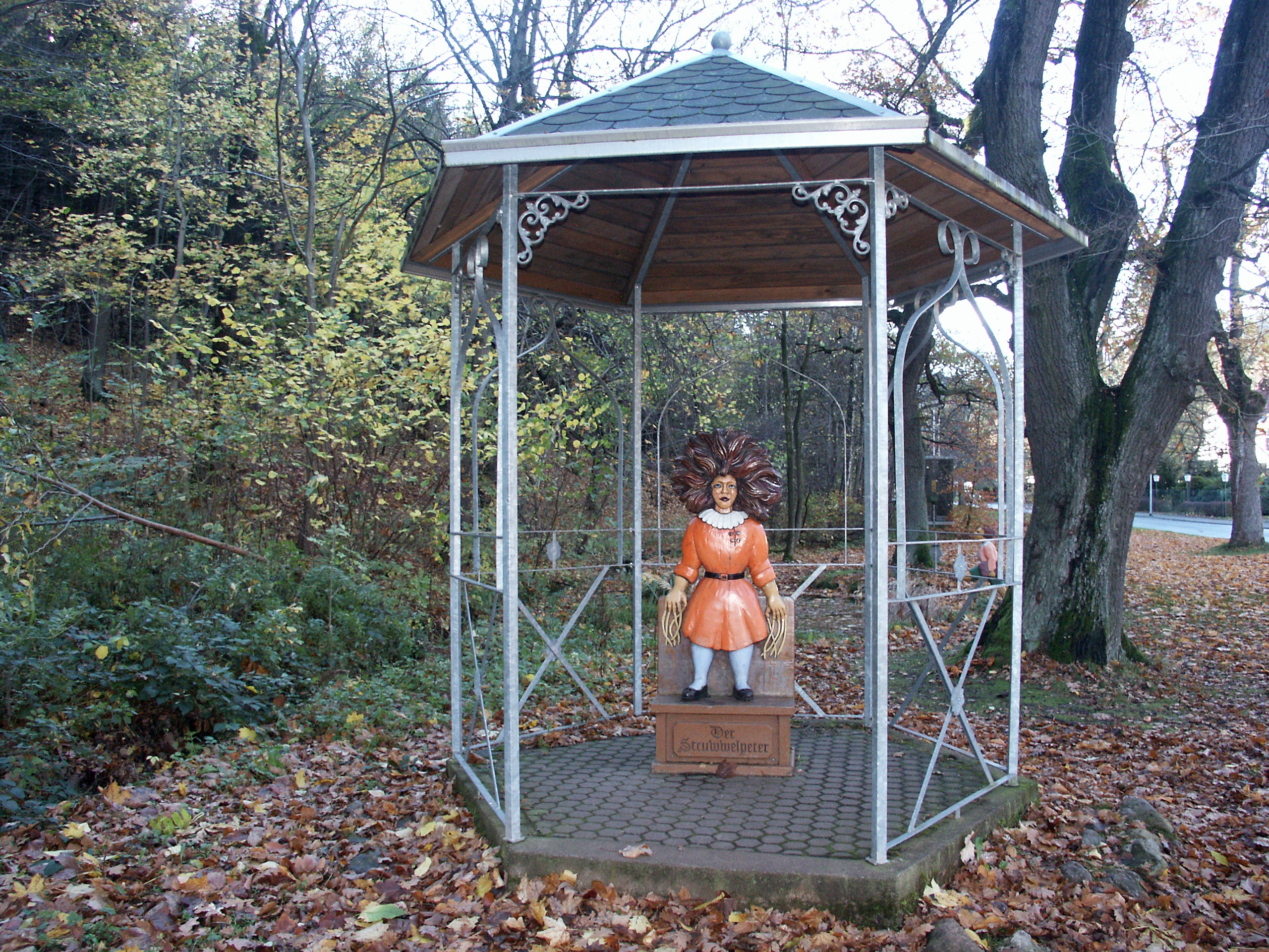 Struwwelpeter-Park Tabarz, geschnitzte Märchenfigur "Der Struwwelpeter"